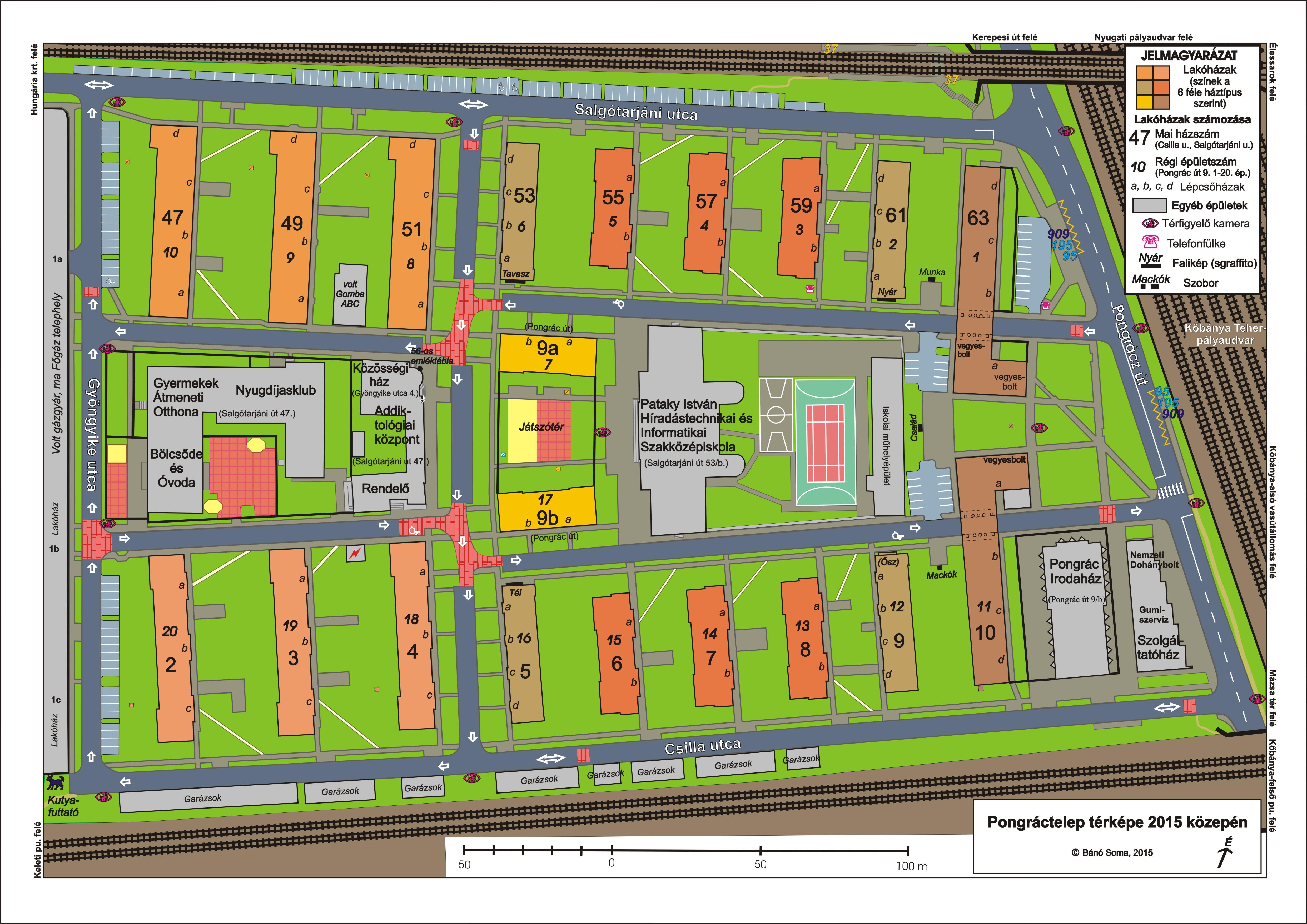 Pongráctelep információs térképe a 2015. májusi állapotok feltüntetésével